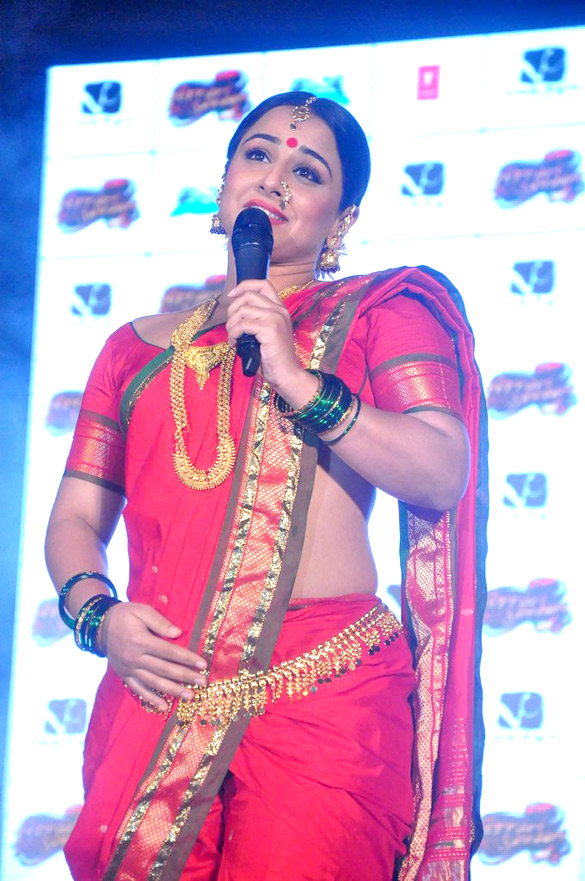 Vidya Balan performs Lavani to promote 'Ferrari Ki Sawaari'